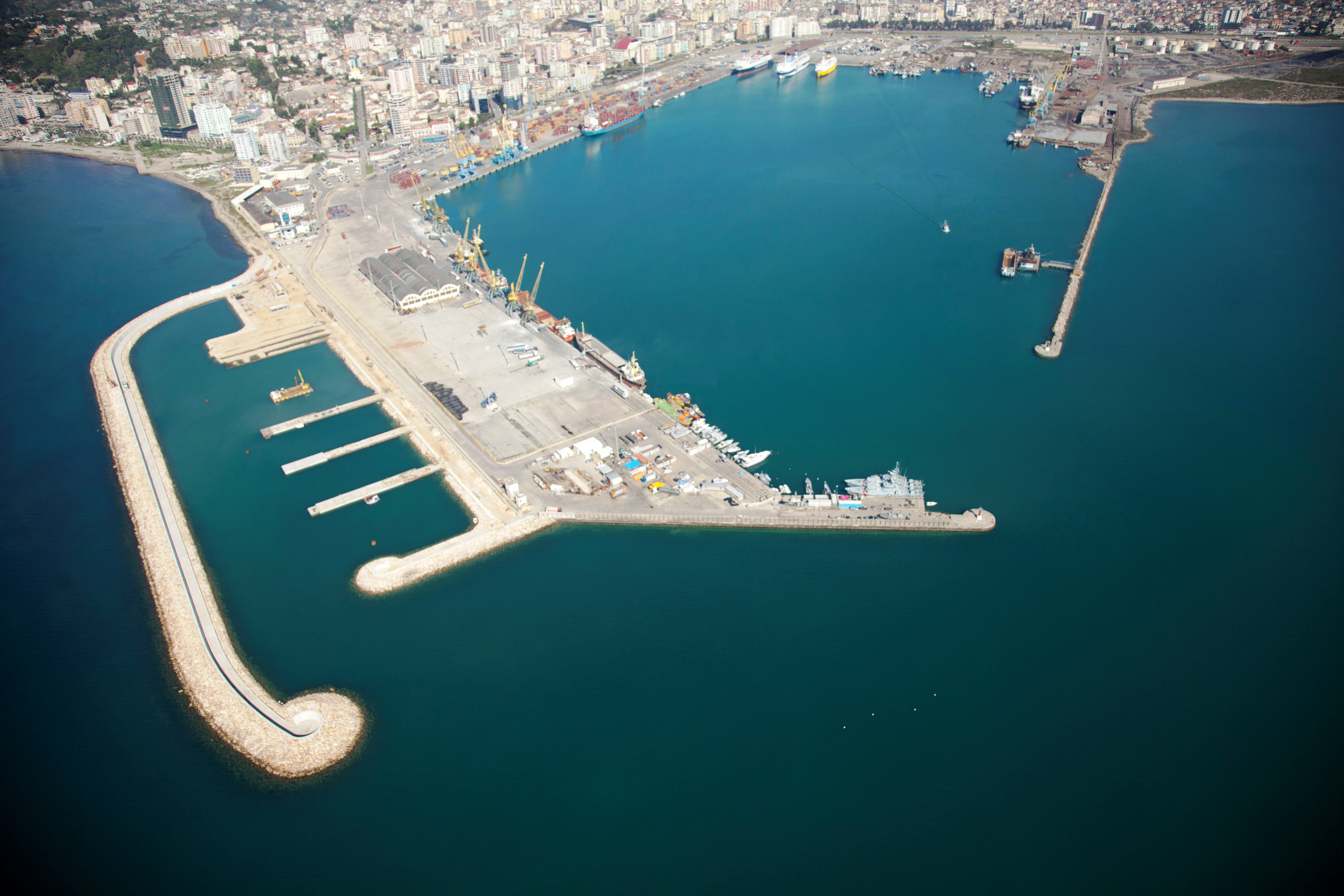 Hafen Durres von oben, Albanien 2014